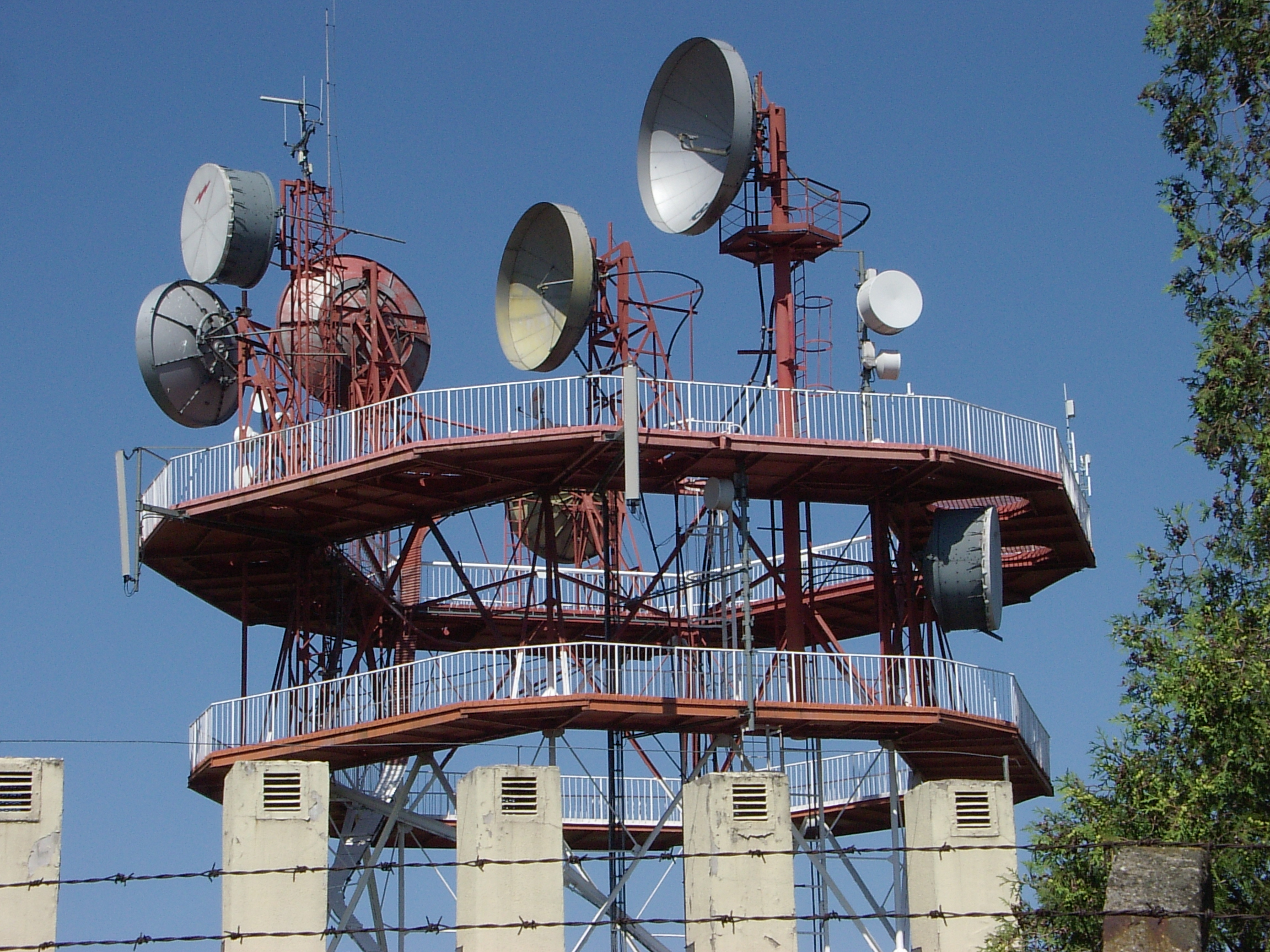 Wzgórze "Radary"